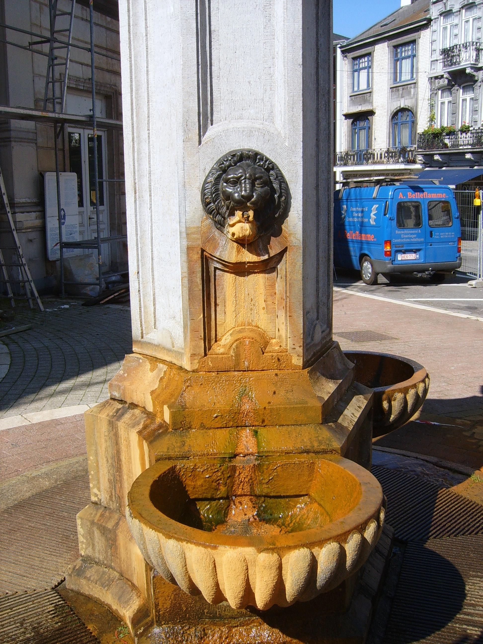 Pouhon des Armes d'Autriche à Spa Personal picture